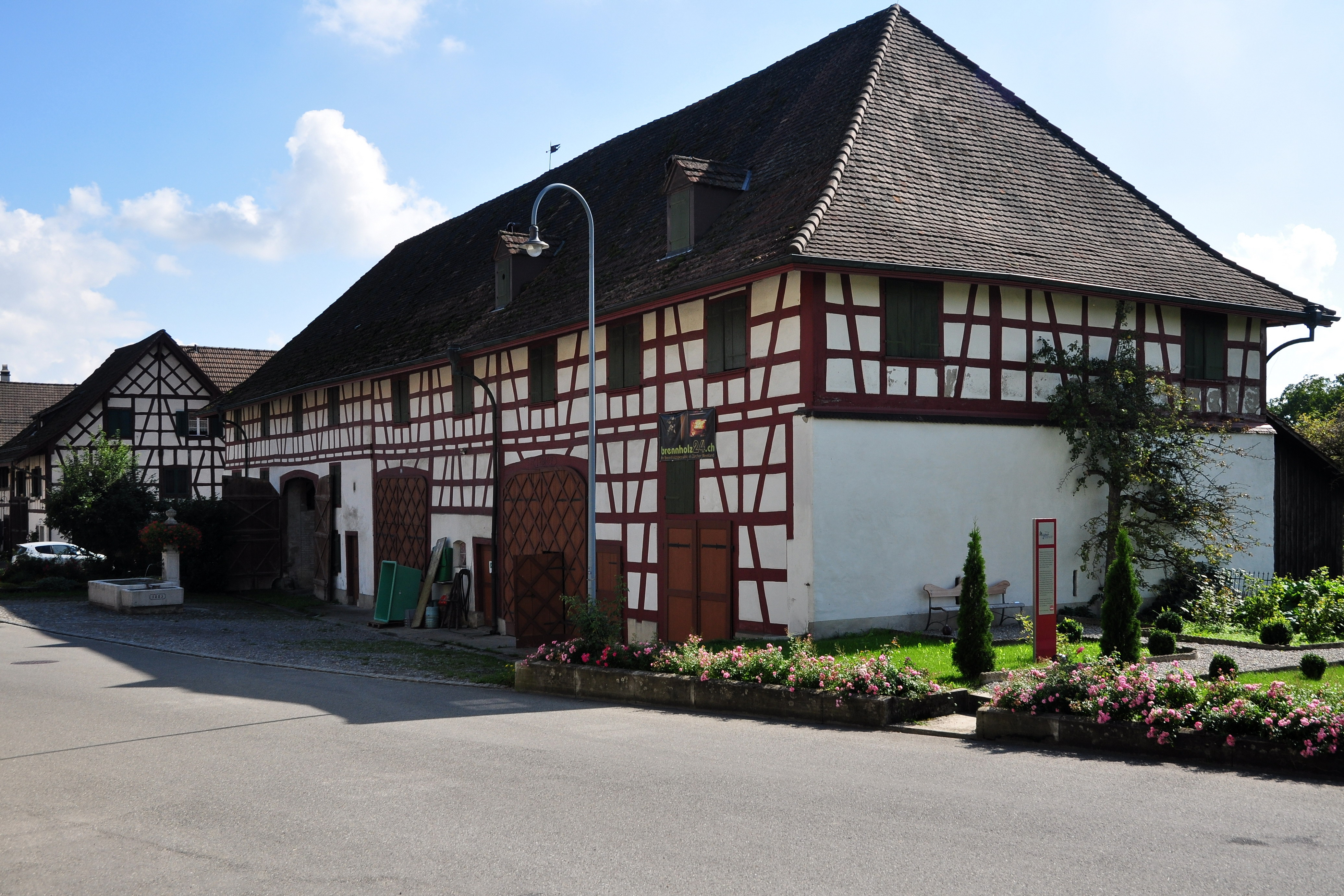 Herrschaftshaus und Doppelscheune, Rudolfingen, Dorfstrasse in Trüllikon (Switzerland)